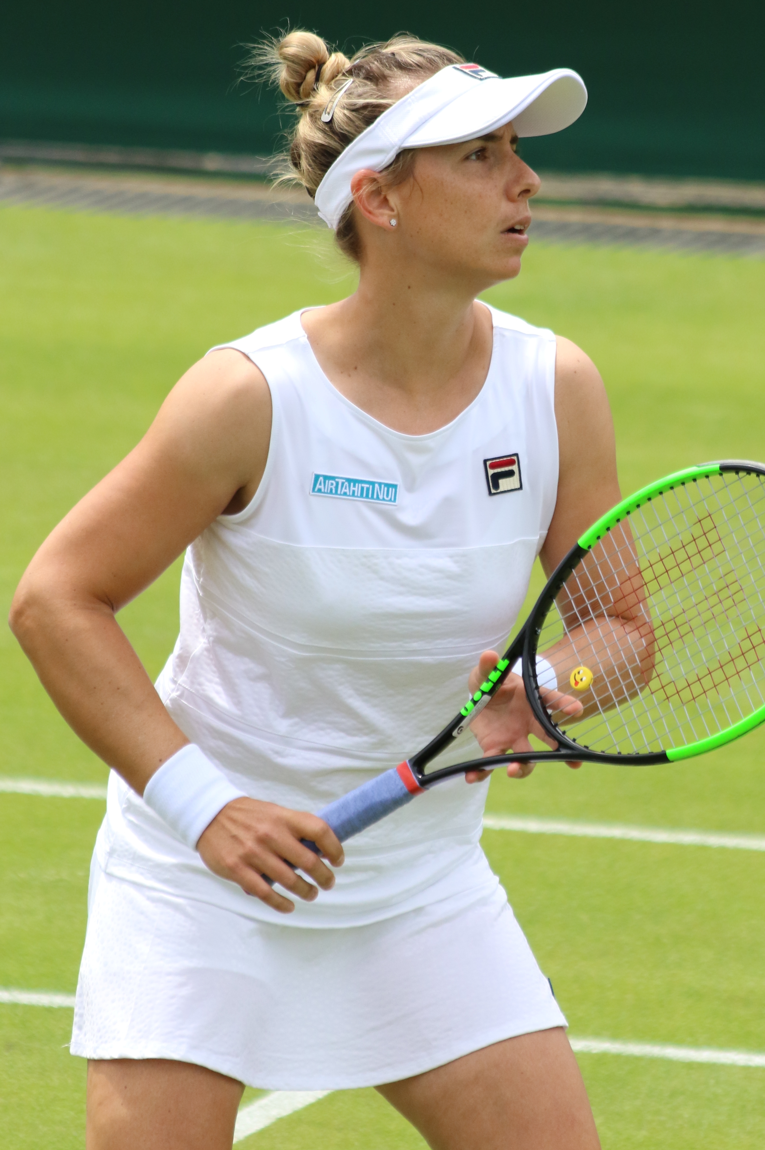 Erakovic WM17 (10)